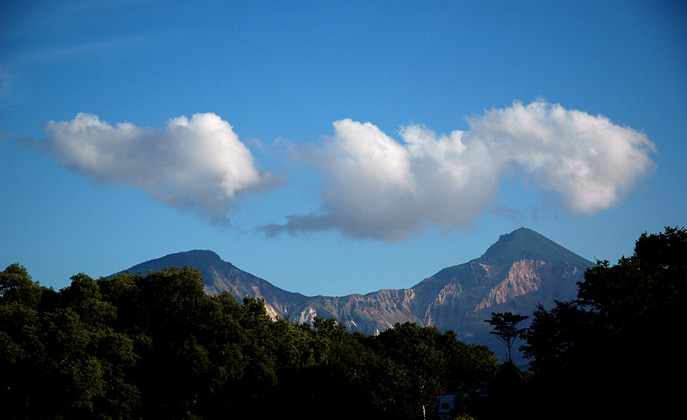 磐梯山 桧原湖からの裏磐梯山